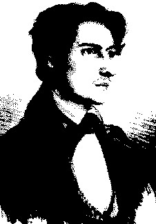 Edgar Freiherr von Westphalen (1819-1890) Sonstiges: ...